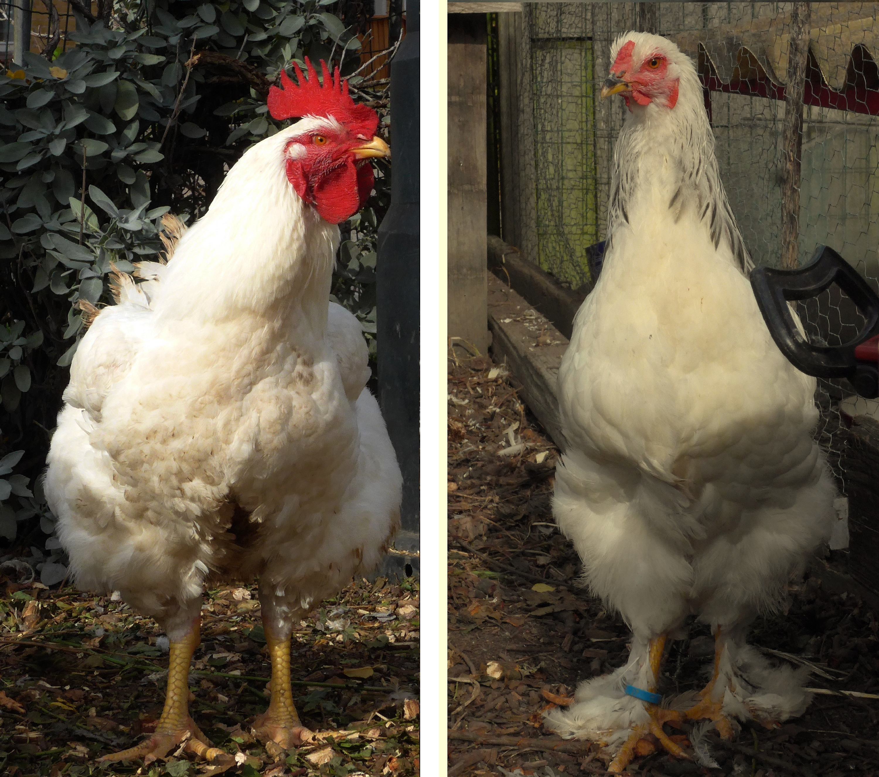 Brahma haan rechts Ross haan links, het Ross vleesras is gefokt o.a. vanuit het Brahma ras. Het fokprogramma was erop gericht een kip met een zo groot mogelijke filet te krijgen, ze worden ook wel dubbelborsten genoemd. bron